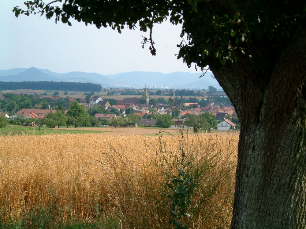 Motiv / Beschreibung: Blick auf Walddorf, im Vordergrund Getreidefeld, im Hintergrund Hochhäuser von Reutlingen und die Achalm sowie die Albkette.